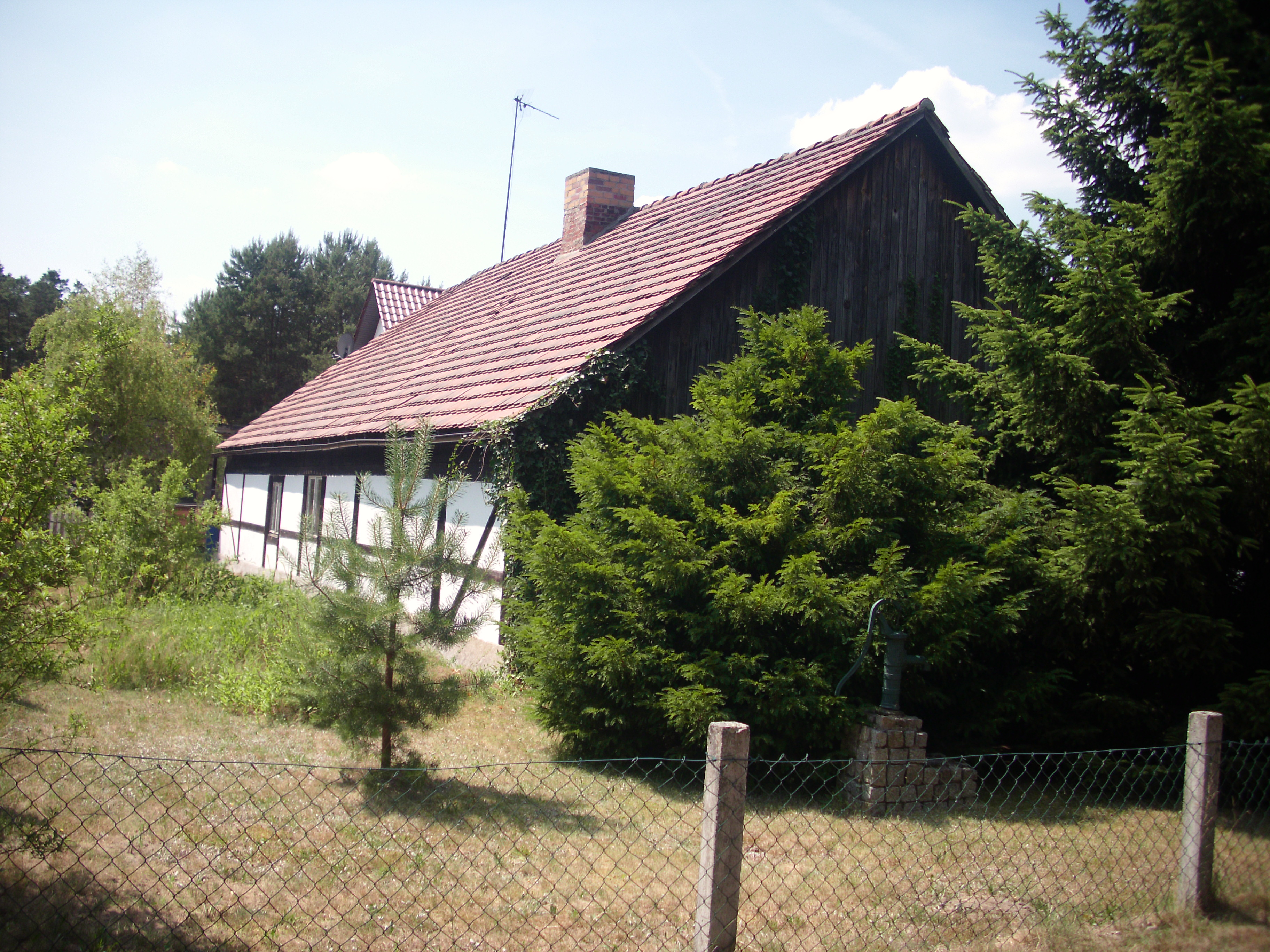 Kolonistenhaus, Biegenbrück, Neubrücker Straße 26